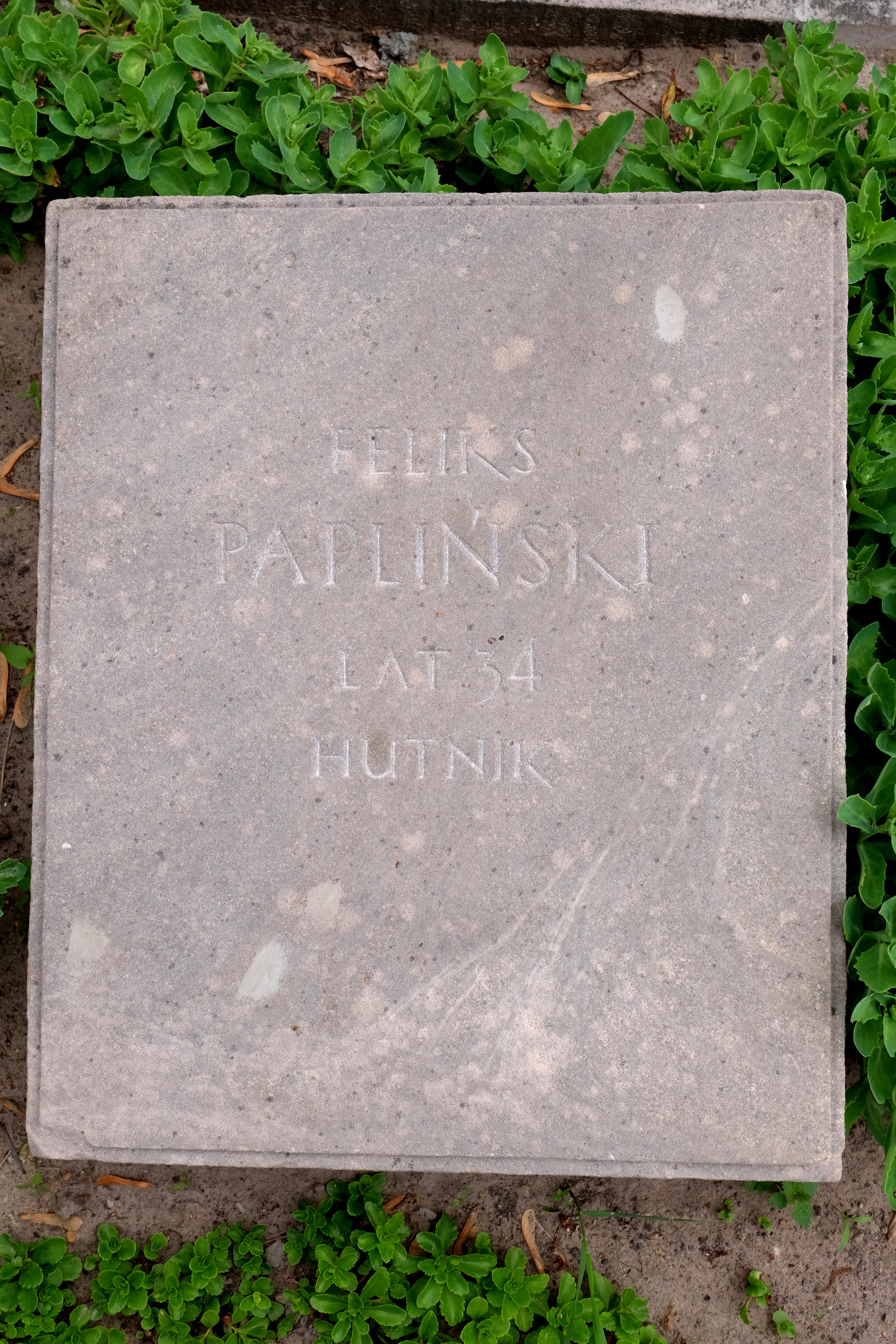 Grób działacza komunistycznego Feliksa Paplińskiego na Cmentarzu Wojskowym na Powązkach w Warszawie